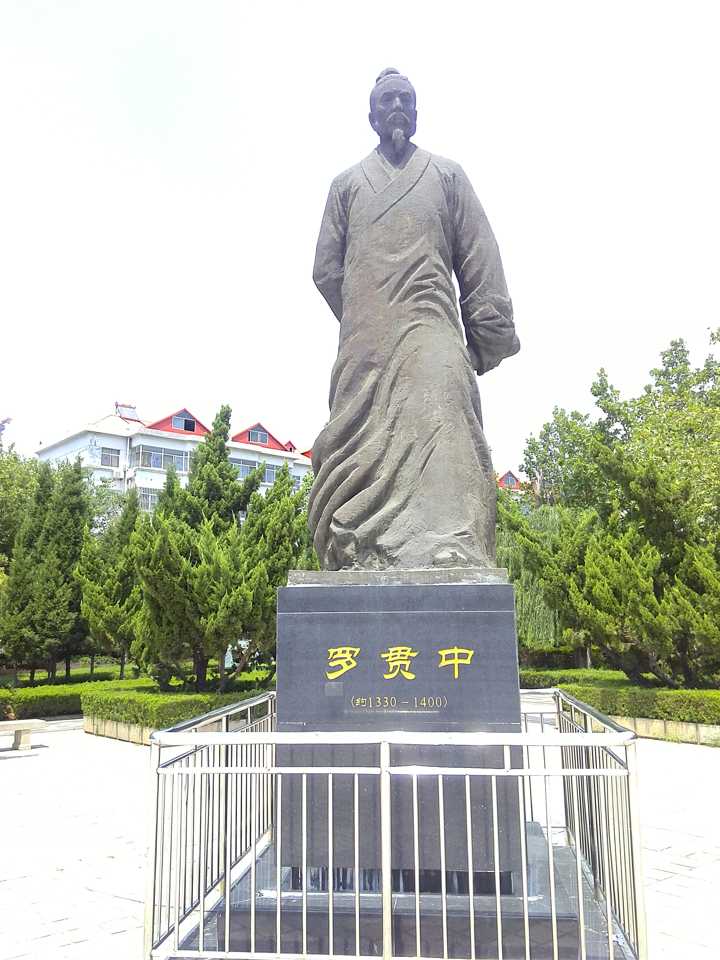 平湖广场罗贯中像